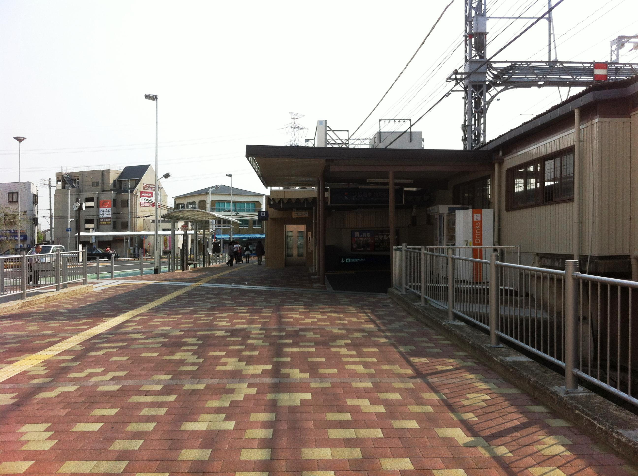 再開発工事完成後の京阪牧野東口画像